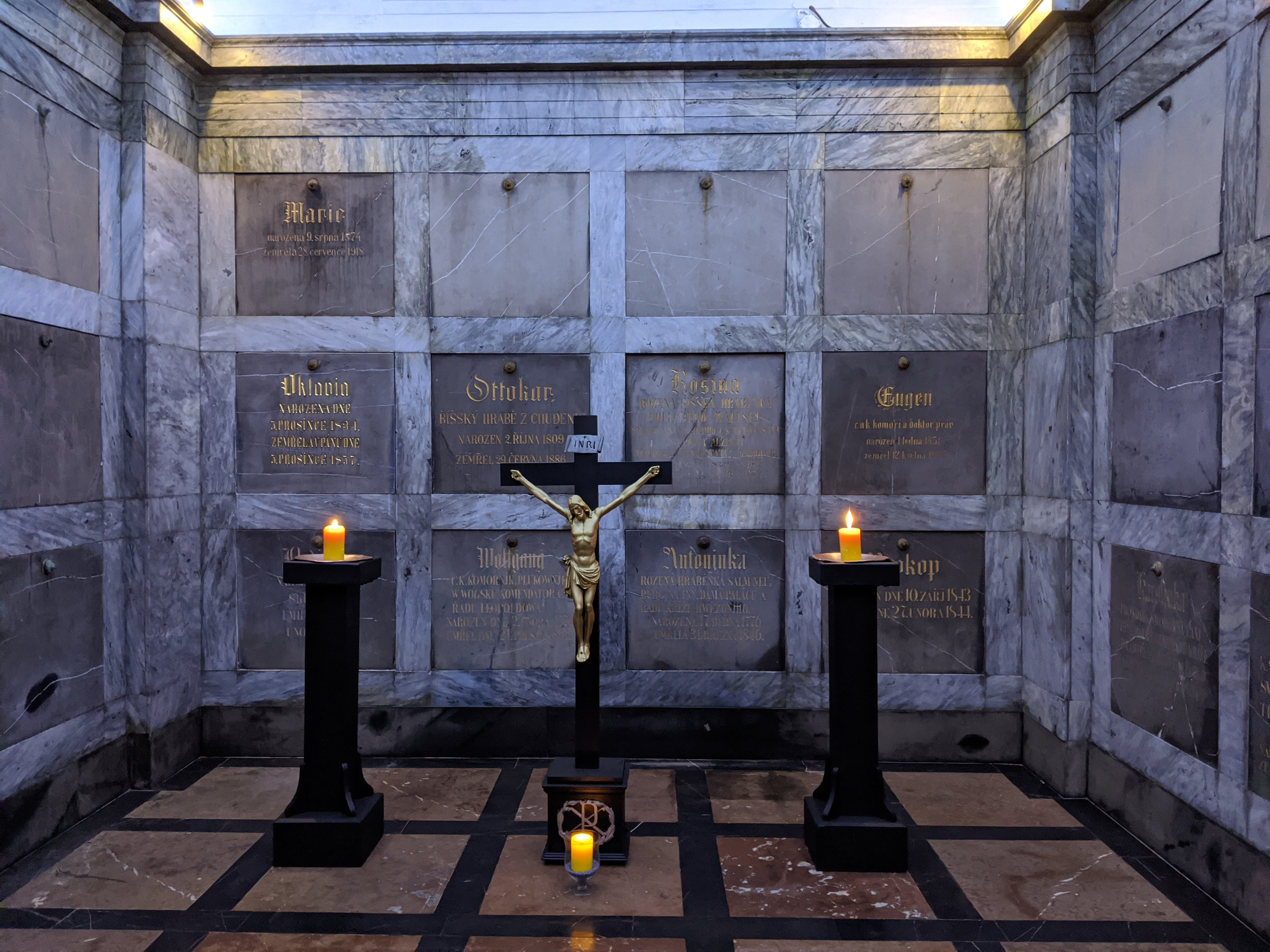 Hrobka Černínů, hřbitov, pp. 1129, Vinoř.